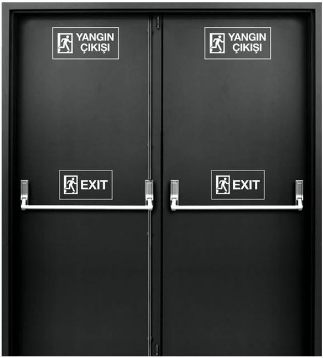 Klasik bir yangın kapısı